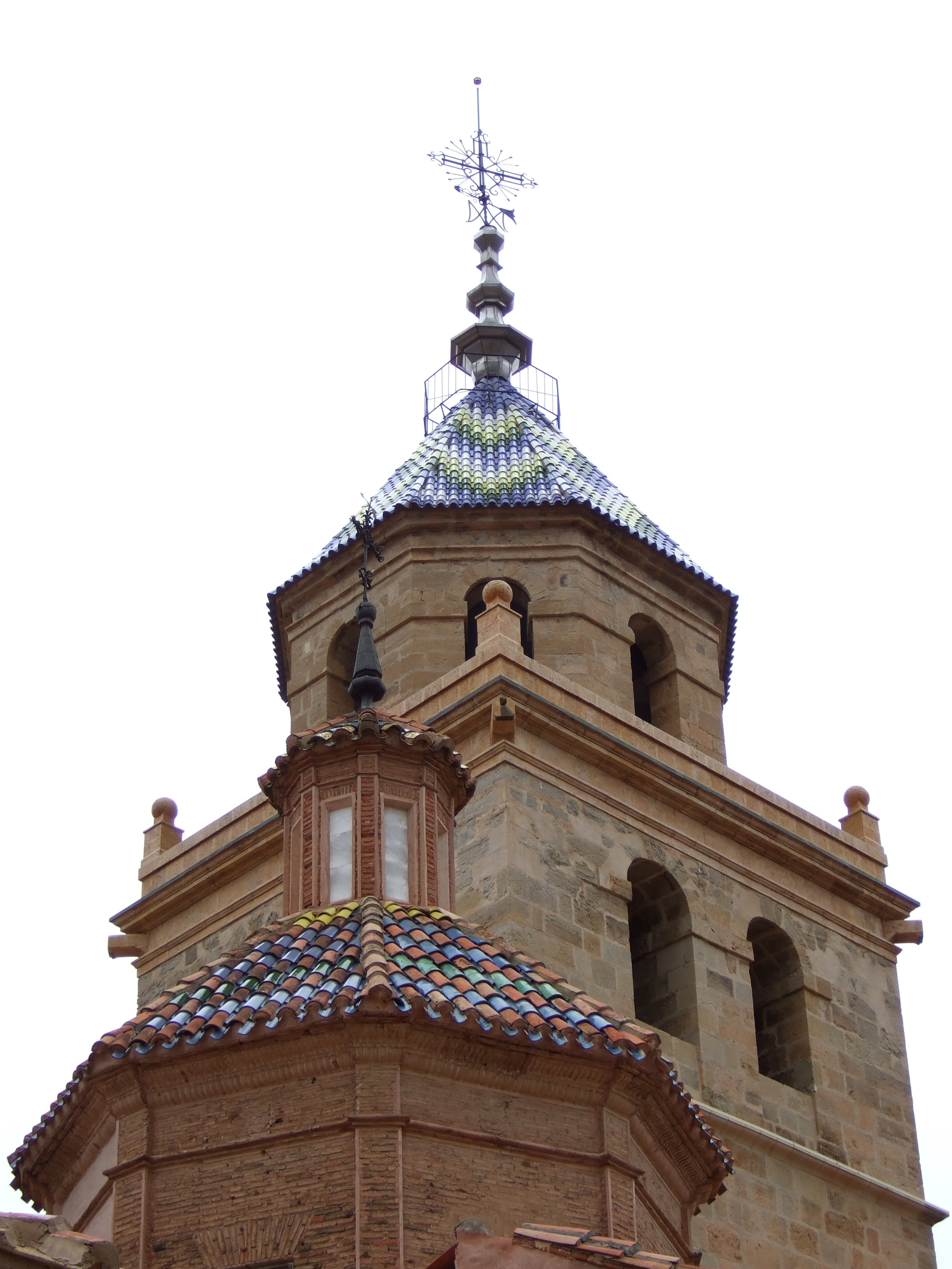 Albarracín - Catedral - Campanario